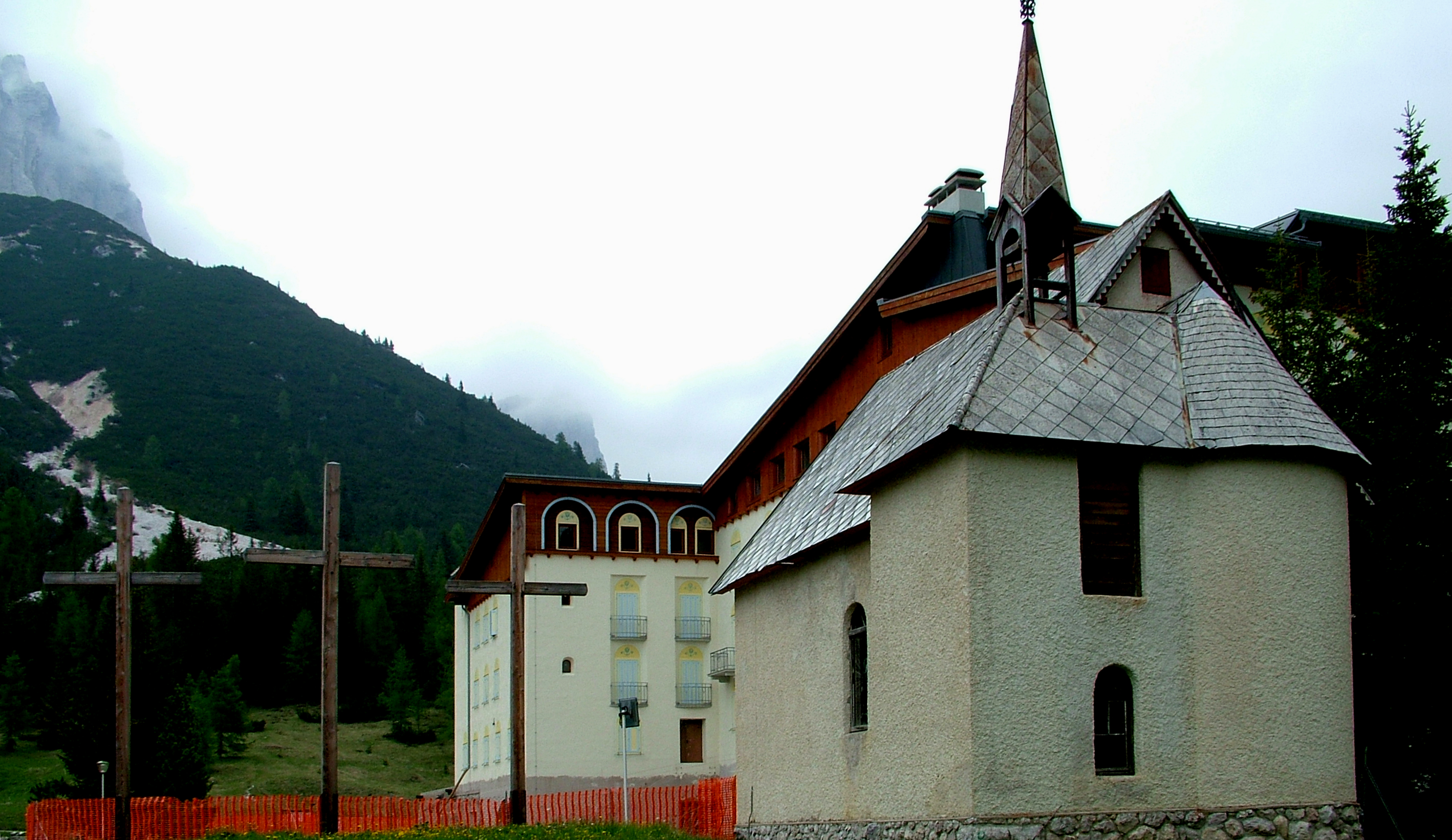 Dolomitok: Tre Croci-hágó, Olaszország (A hágó nevét adó három kereszt)